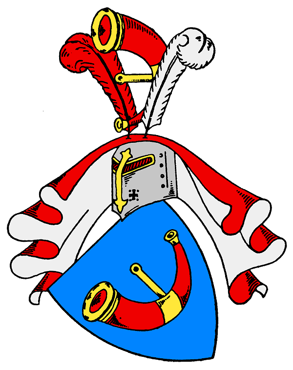 Wappen derer von Medem